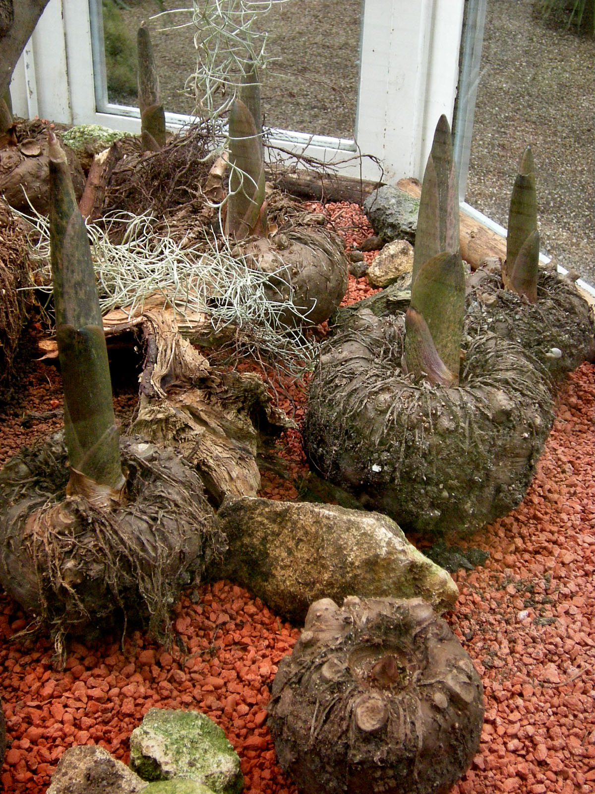 from Palm house at Schönbrunn, Vienna